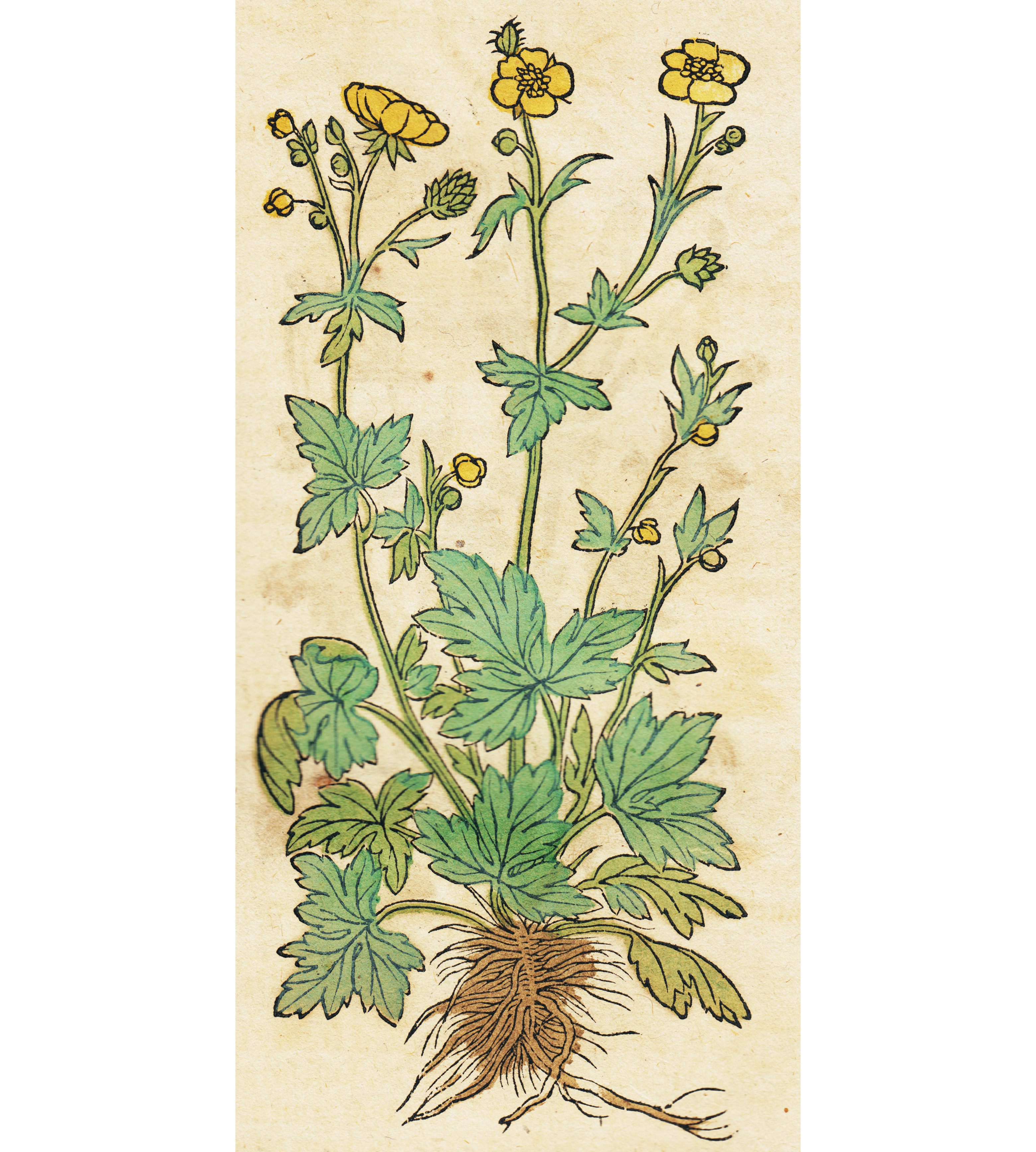 Abbildung des scharfen Hahnefuss